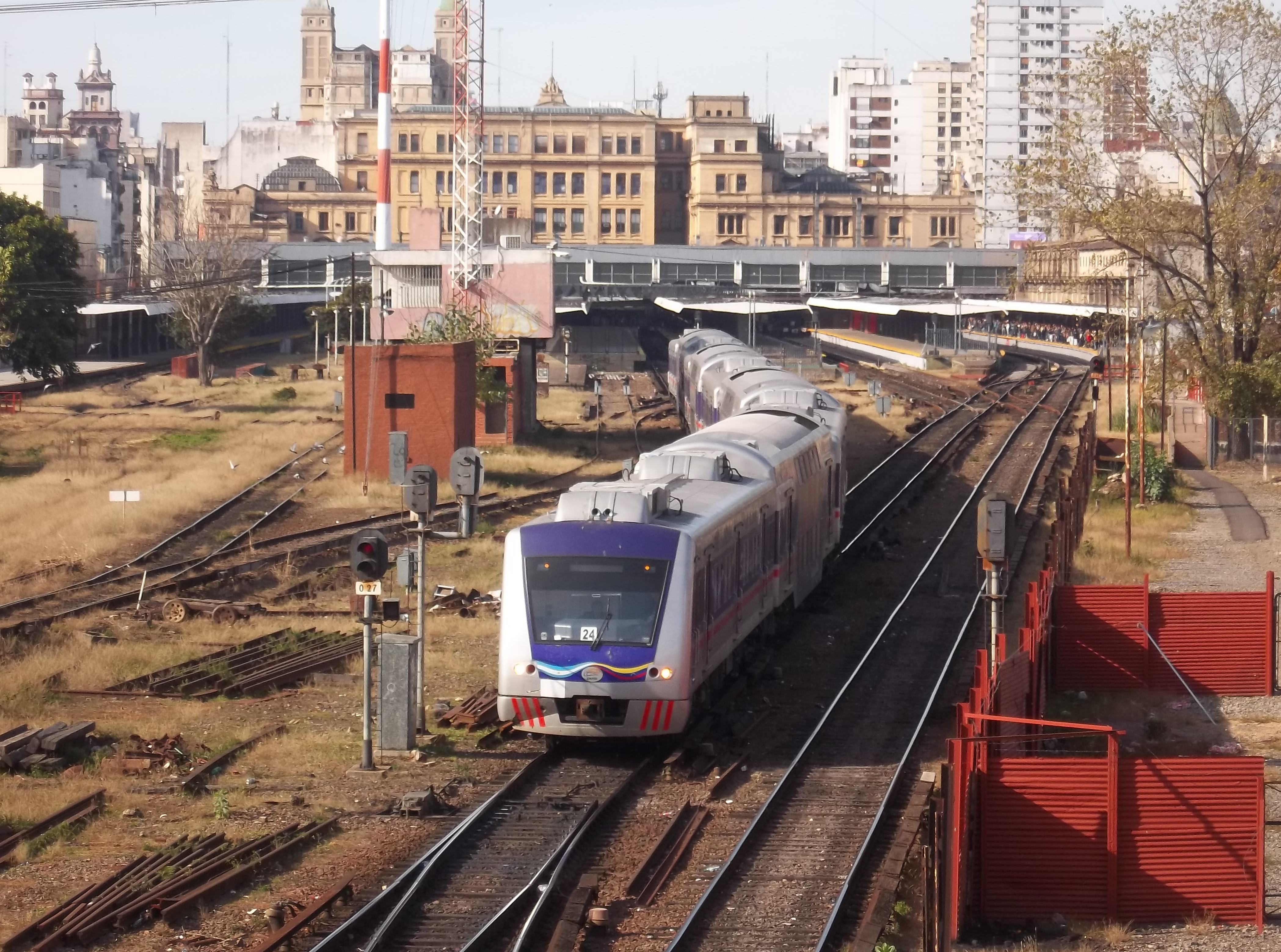 Formación saliendo de la estación Once de Septiembre desde el puente peatonal de la calle Sánchez de Bustamante, en la ciudad de Buenos Aires, Argentina.